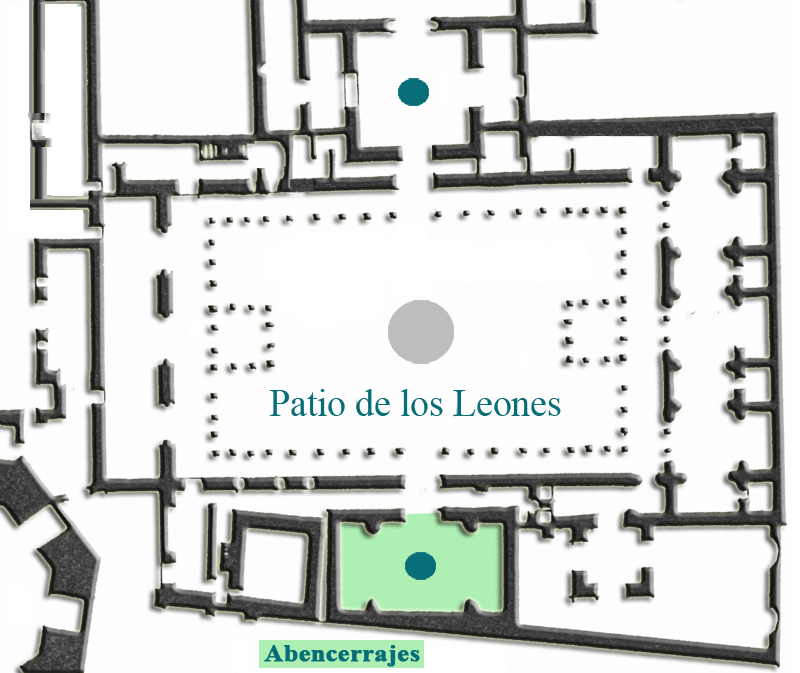 Plano de situación del Patio de los leones y la Sala de los Abencerrajes en la Alhambra de Granada, España.